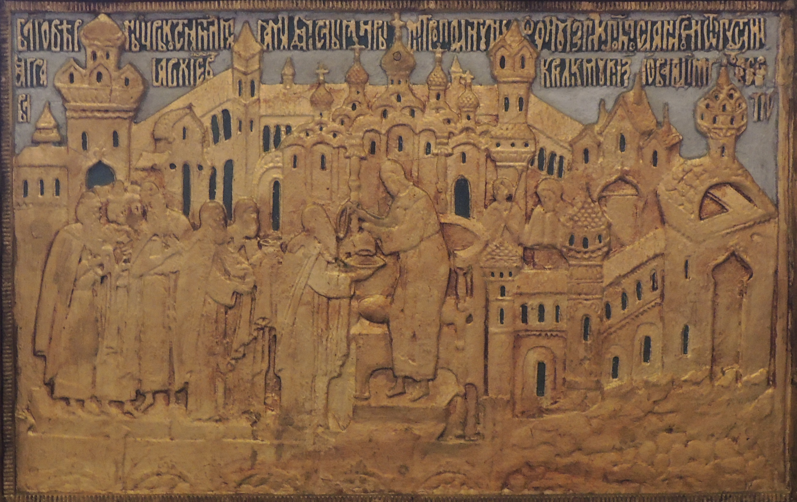 "Мономахов трон" (копия, ГИМ)